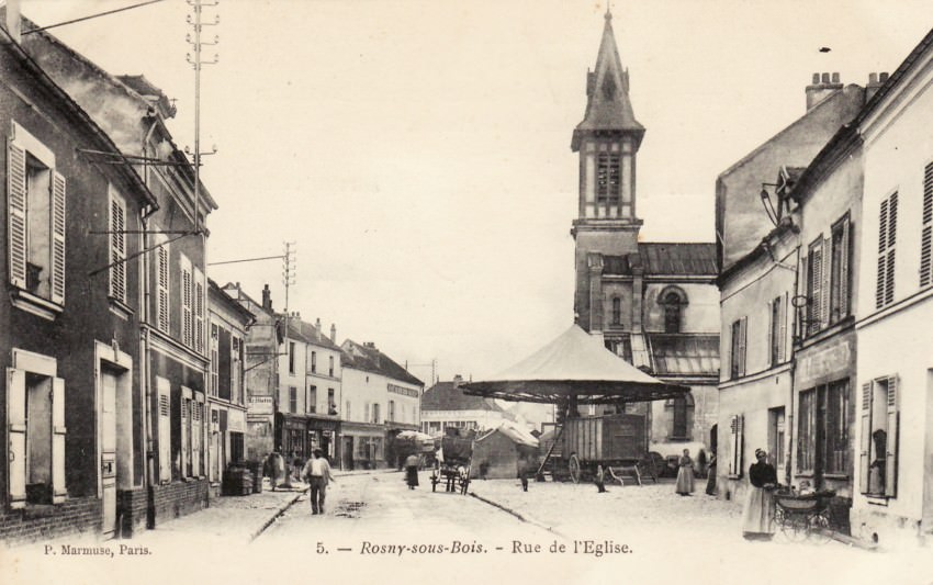 Rue de l'Eglise à Rosny-sous-Bois